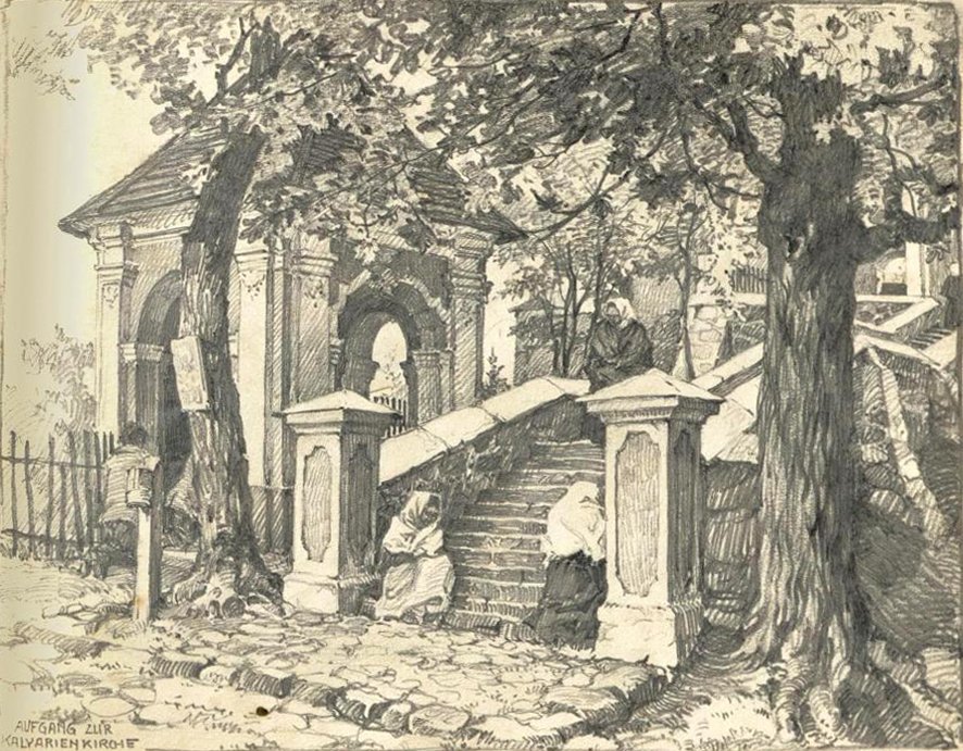 Беларуская (тарашкевіца): Вільня (Vilnia), Кальварыя (Kalvaryja). Капліца